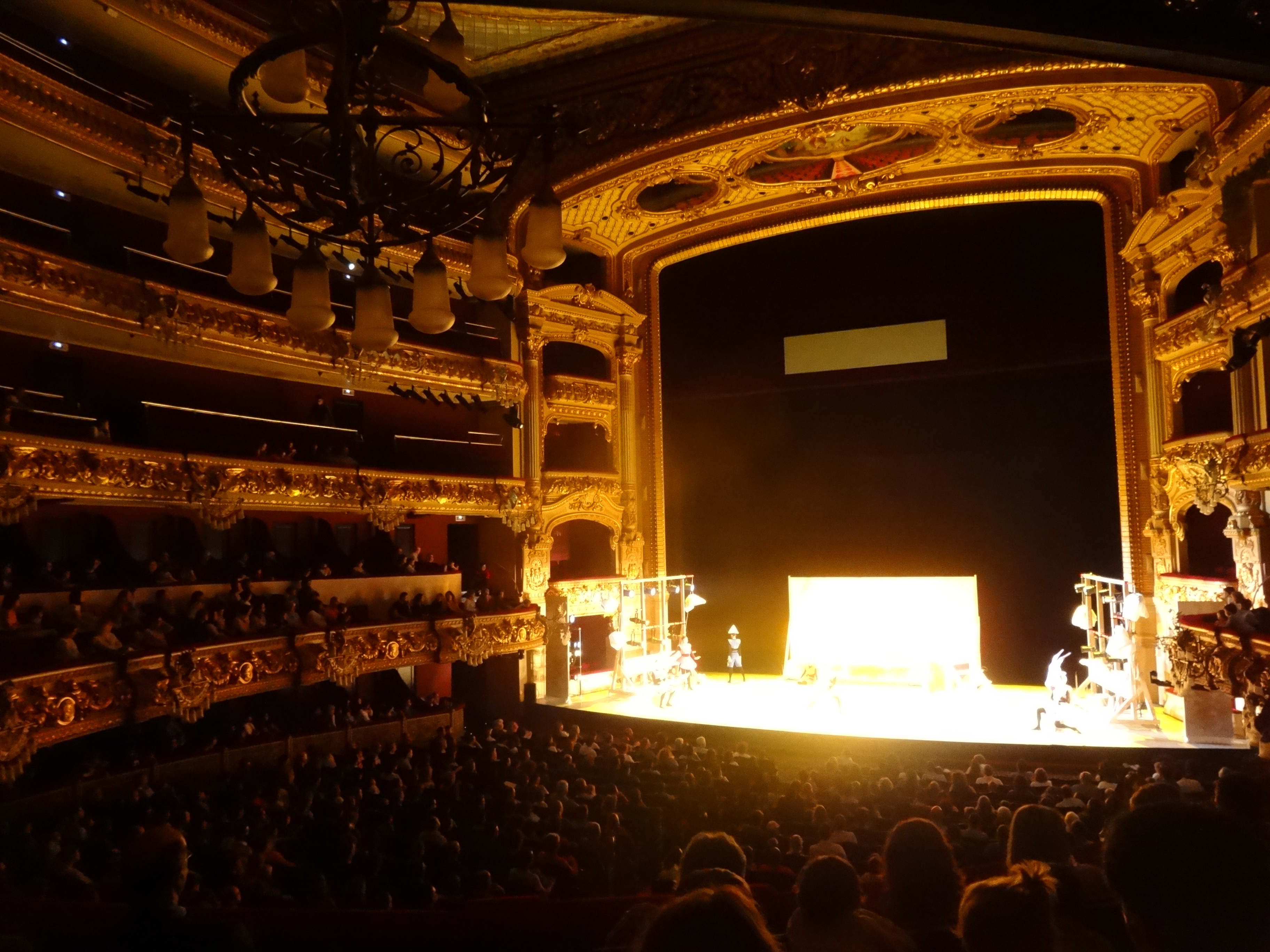 Gran Teatre del Liceu